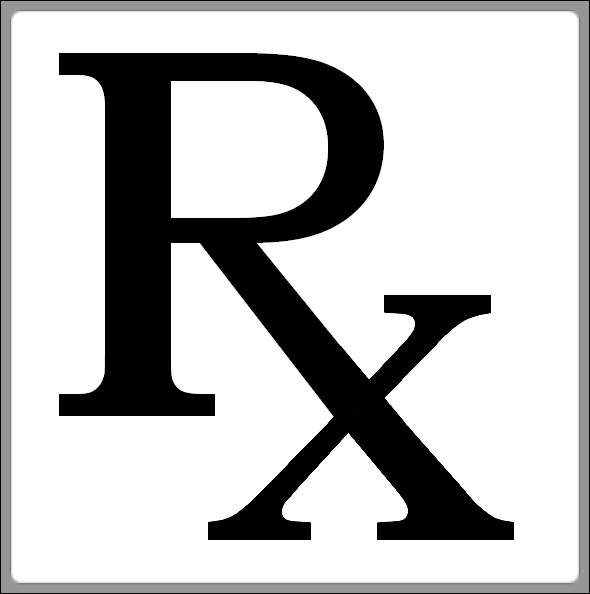 Pharmacy Rx symbol